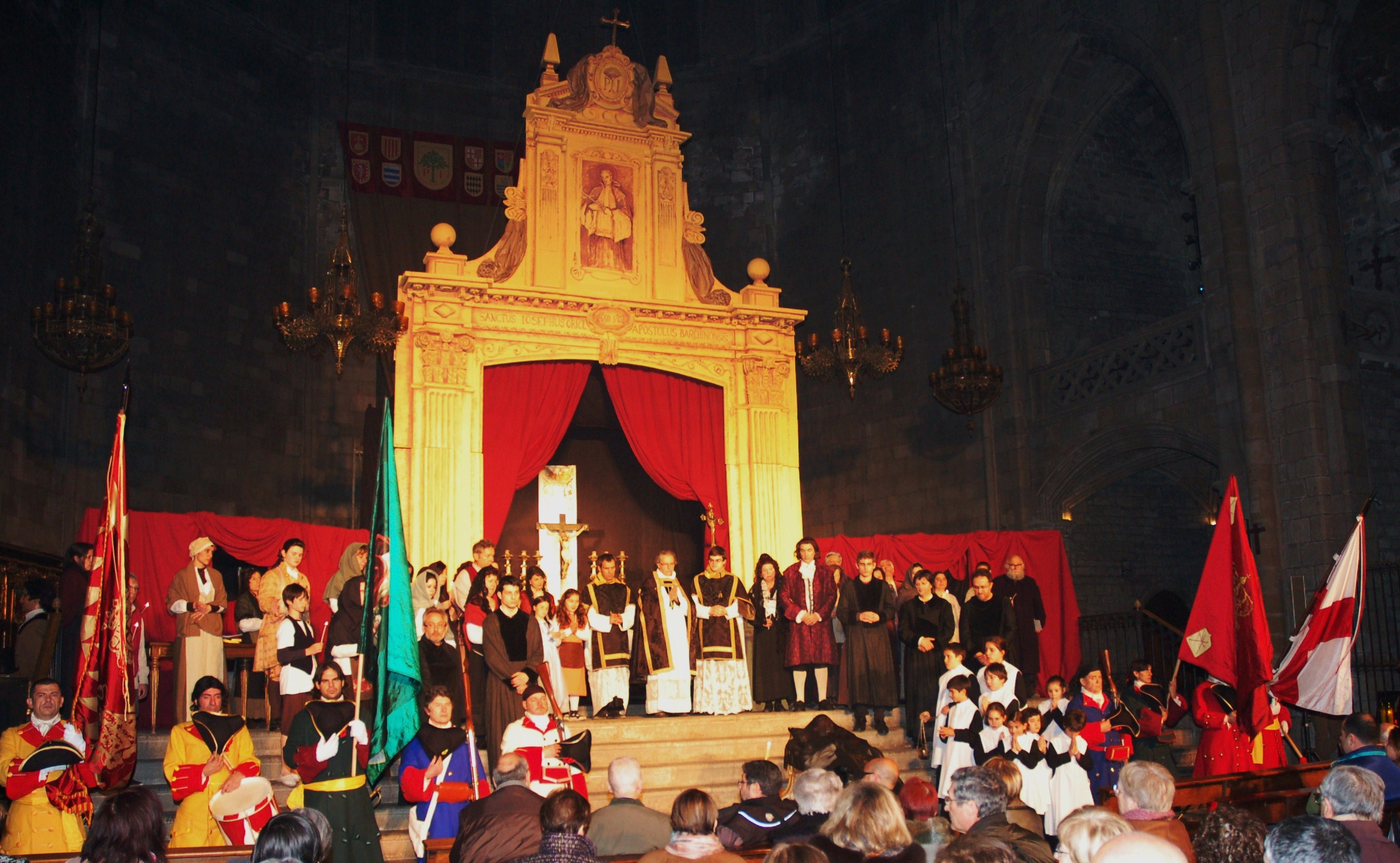 Final a l'escena dalt del presbiteri de la basílica